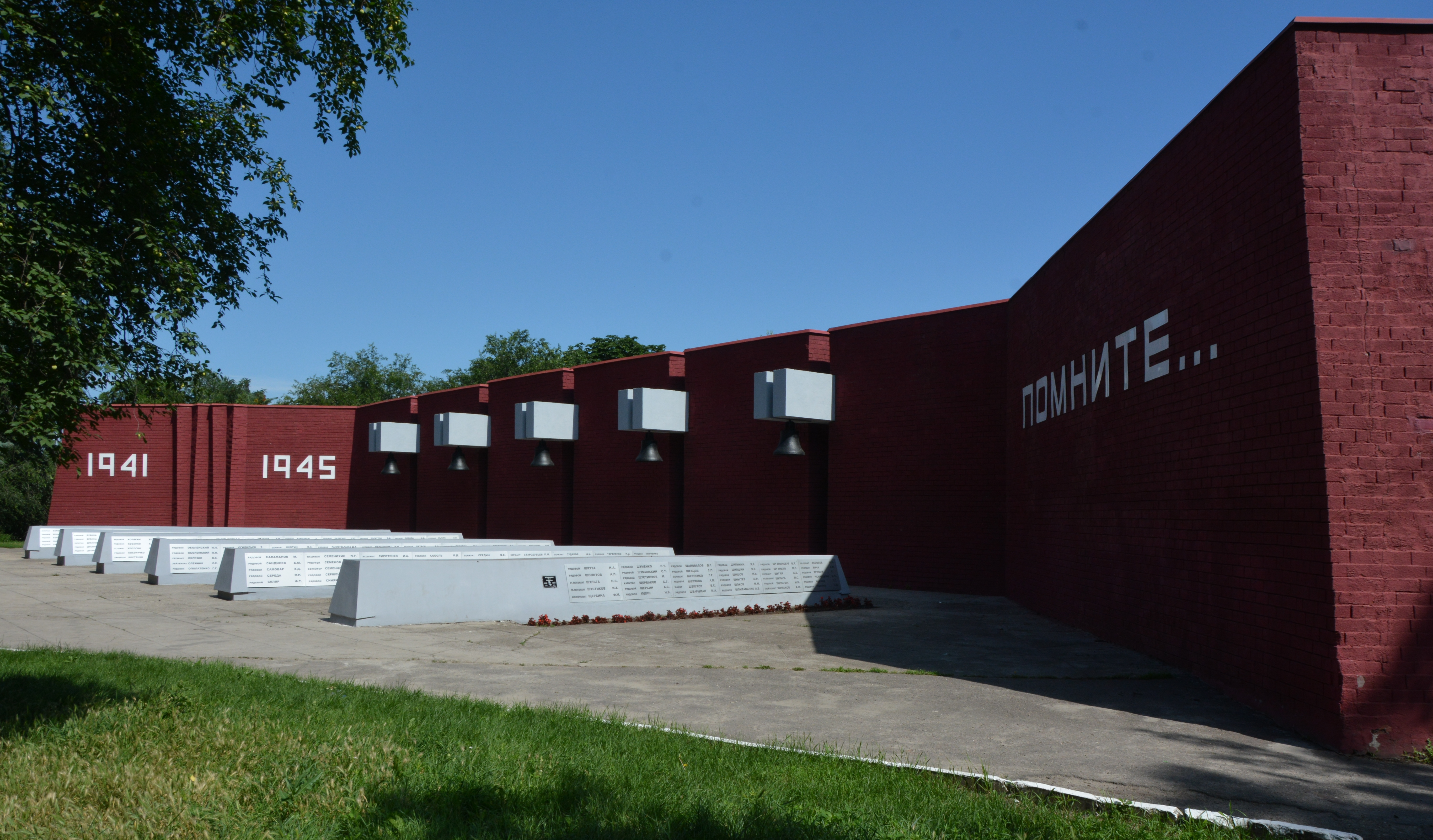 Шість братських могил радянських воїнів, які загинули та померли від поранень у шпиталях Дніпропетровська, серед них Герої Радянського Союзу Горелов В.П. та Шишкін І.М. Всього поховано 427 воїнів (10.1943 р.-04.1944 р.), Дніпропетровськ, пр-т С. Нігояна (парк ім. Калініна)